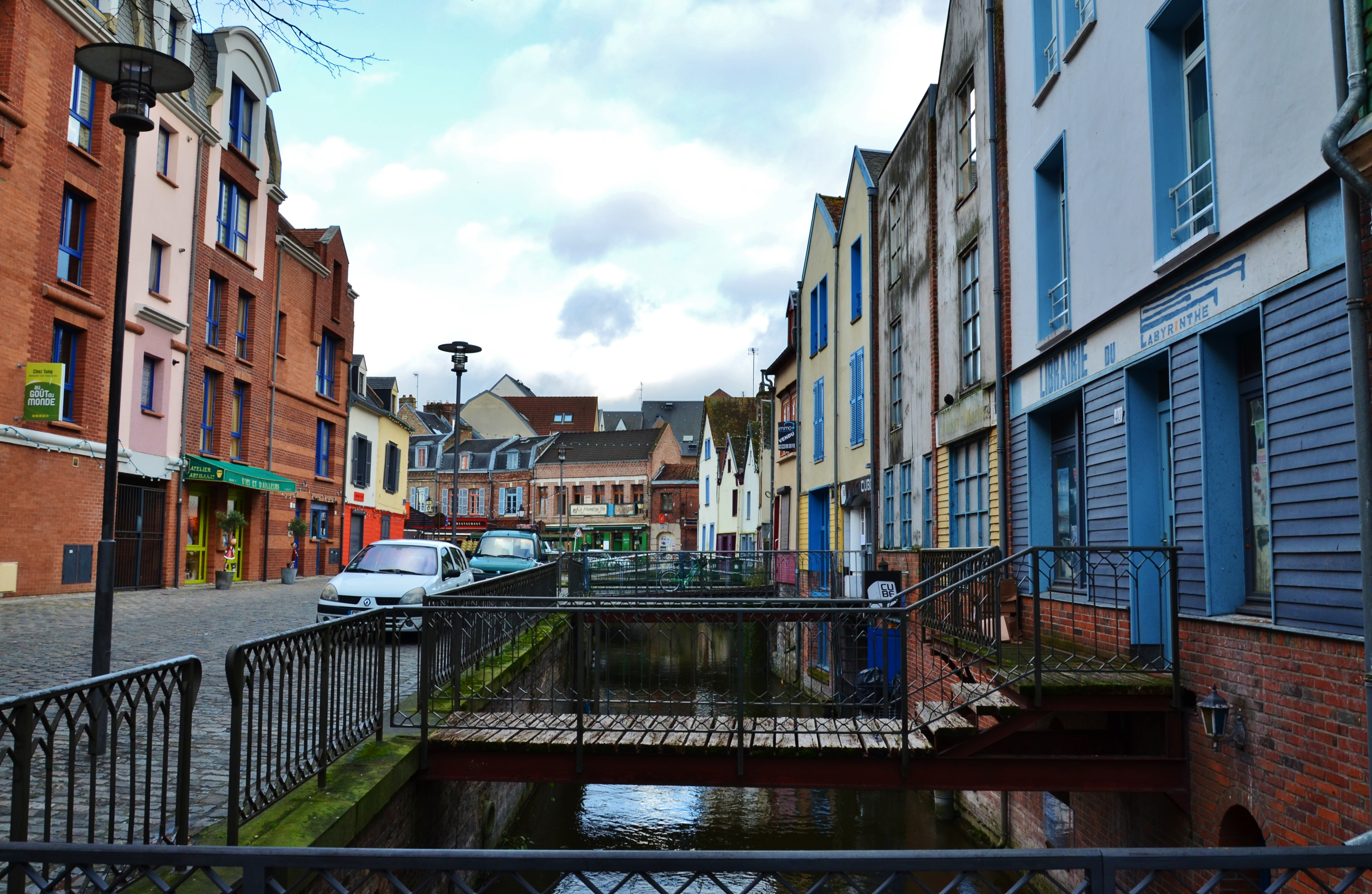 Amiens rue du Don en décembre 2012